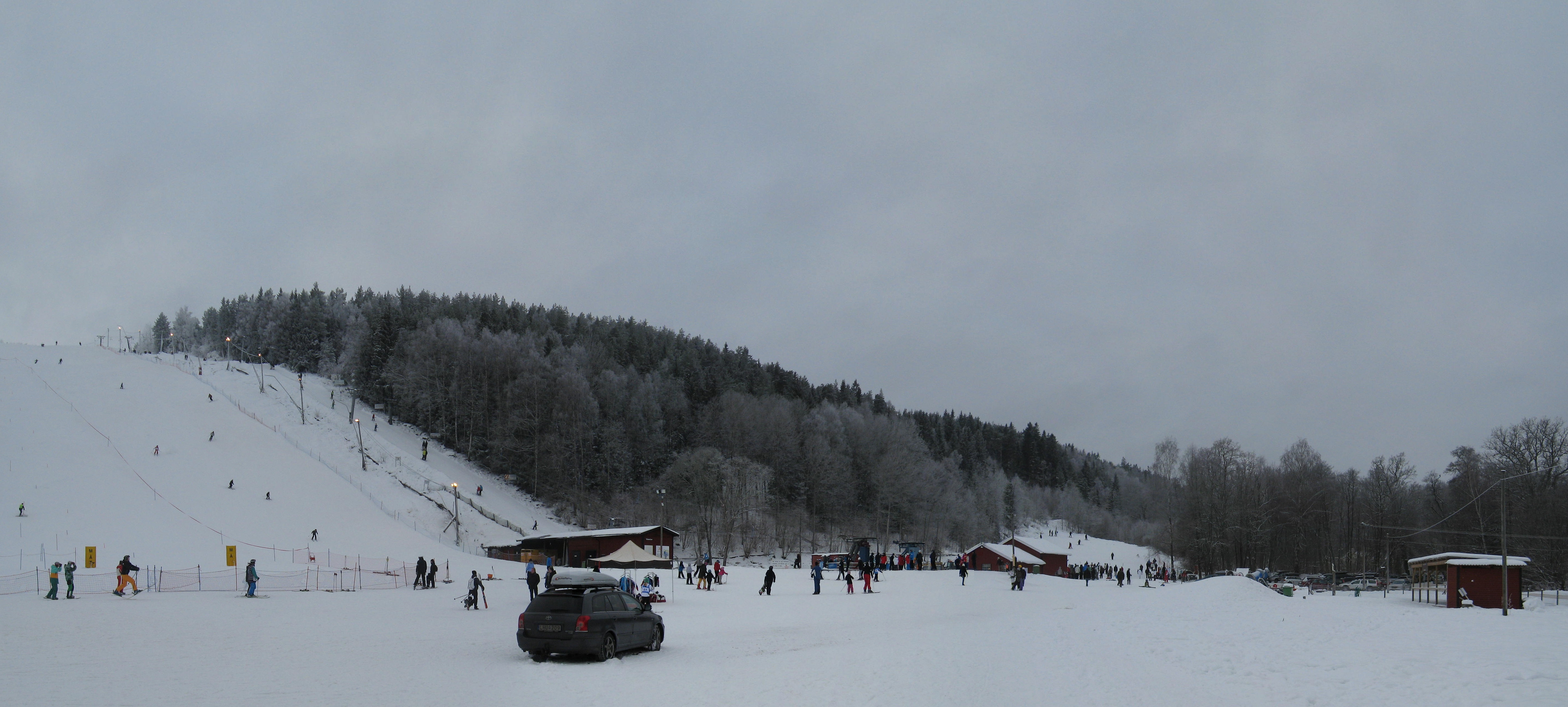 Yxbacken.